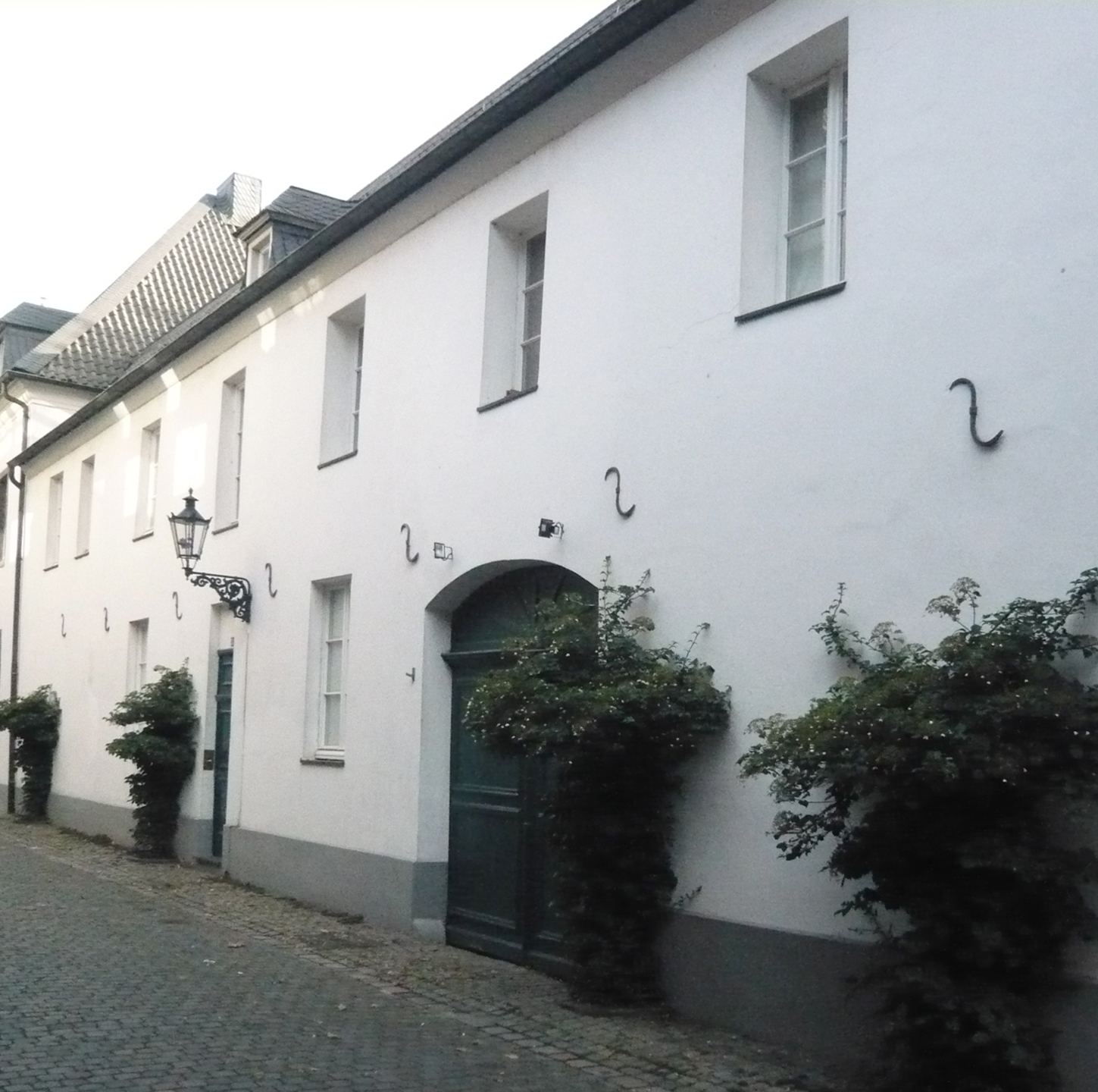 Haus Ursulinengasse 3a, welches sich an das Eckhaus Ritterstraße 10 anschließt, Düsseldorf-Altstadt, Sicht Richtung Ritterstraße